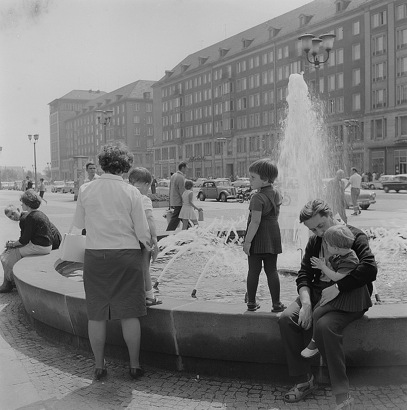 Original image description from the Deutsche Fotothek Dresden. Blick entlang der Ernst-Thälmann-Straße Richtung Pirnaischer Platz